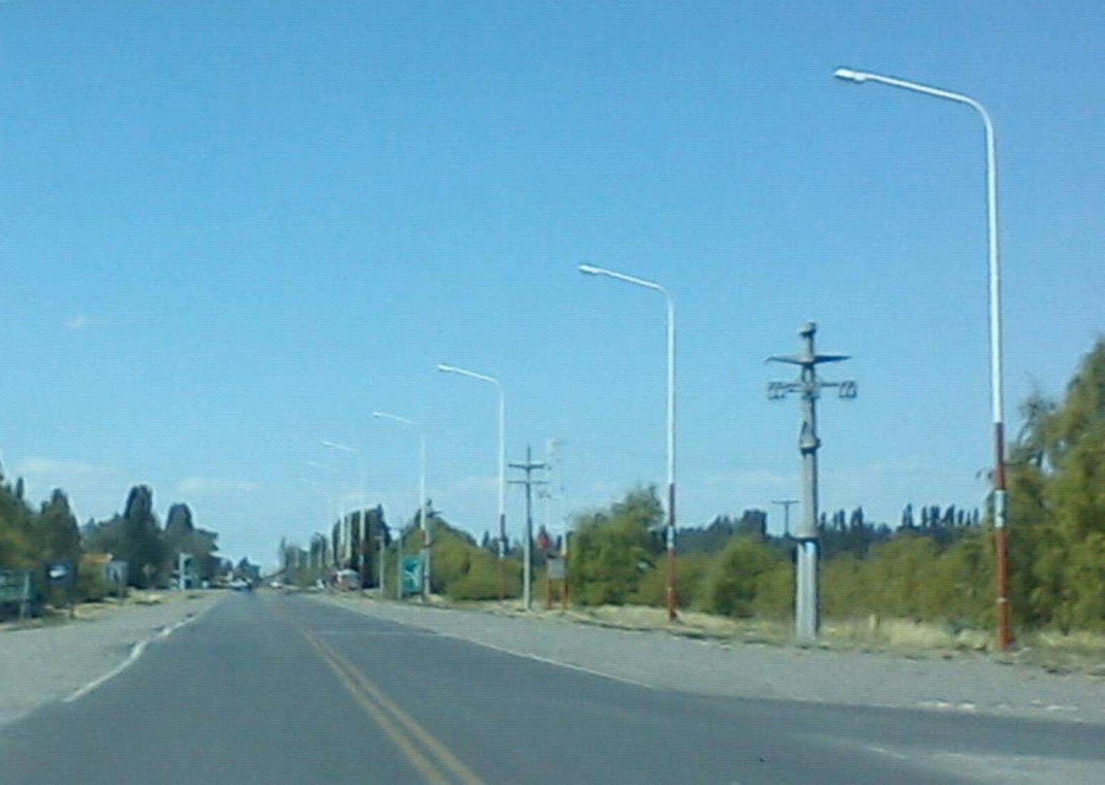 Vistas de Sarmiento